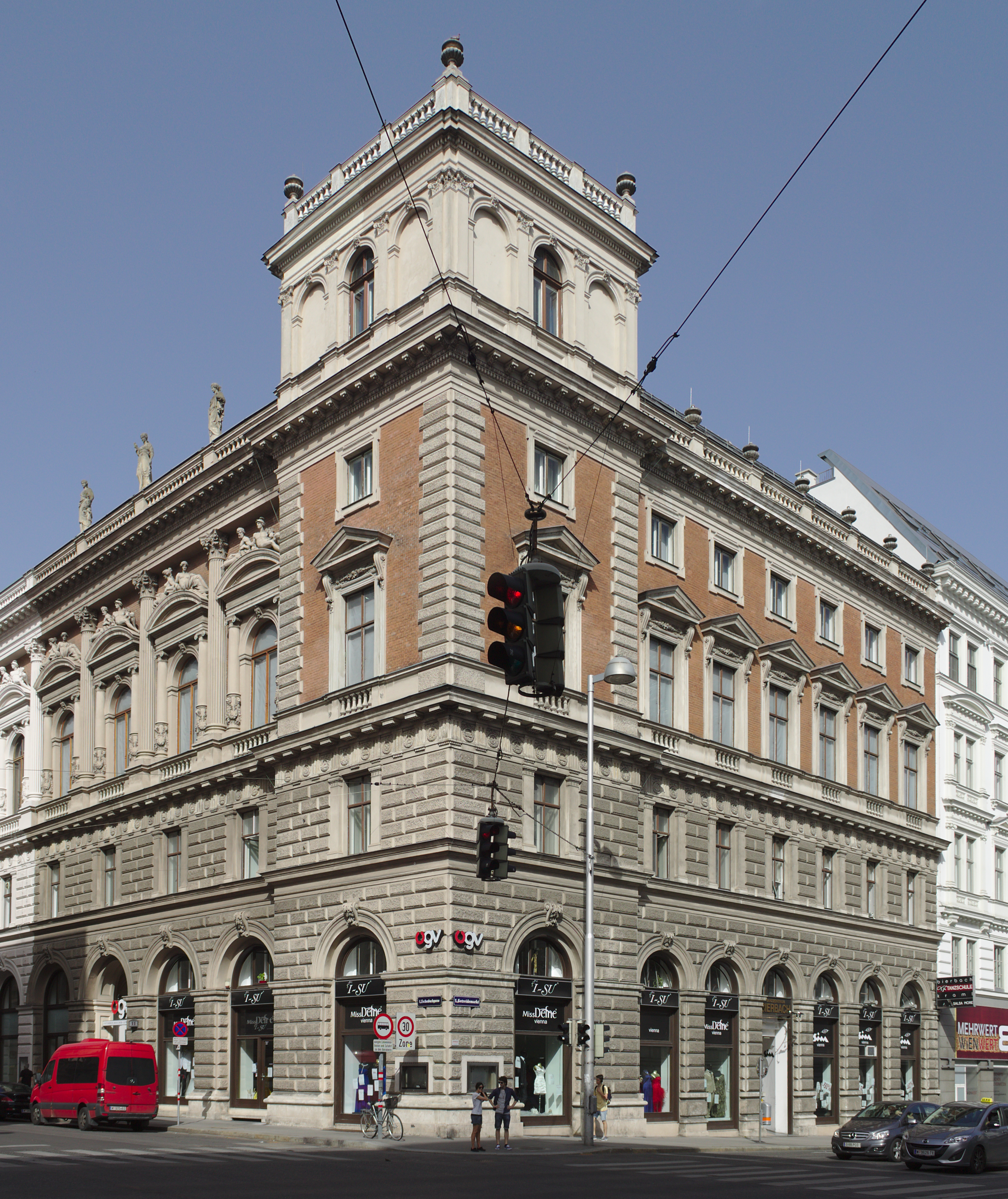 Gebäude des Österr. Gewerbevereins, Palais Eschenbach